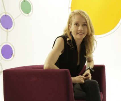 Camila Morgado, nome artístico de Camila Ribeiro da Silva (Petrópolis, 12 de abril de 1975), é uma atriz brasileira.